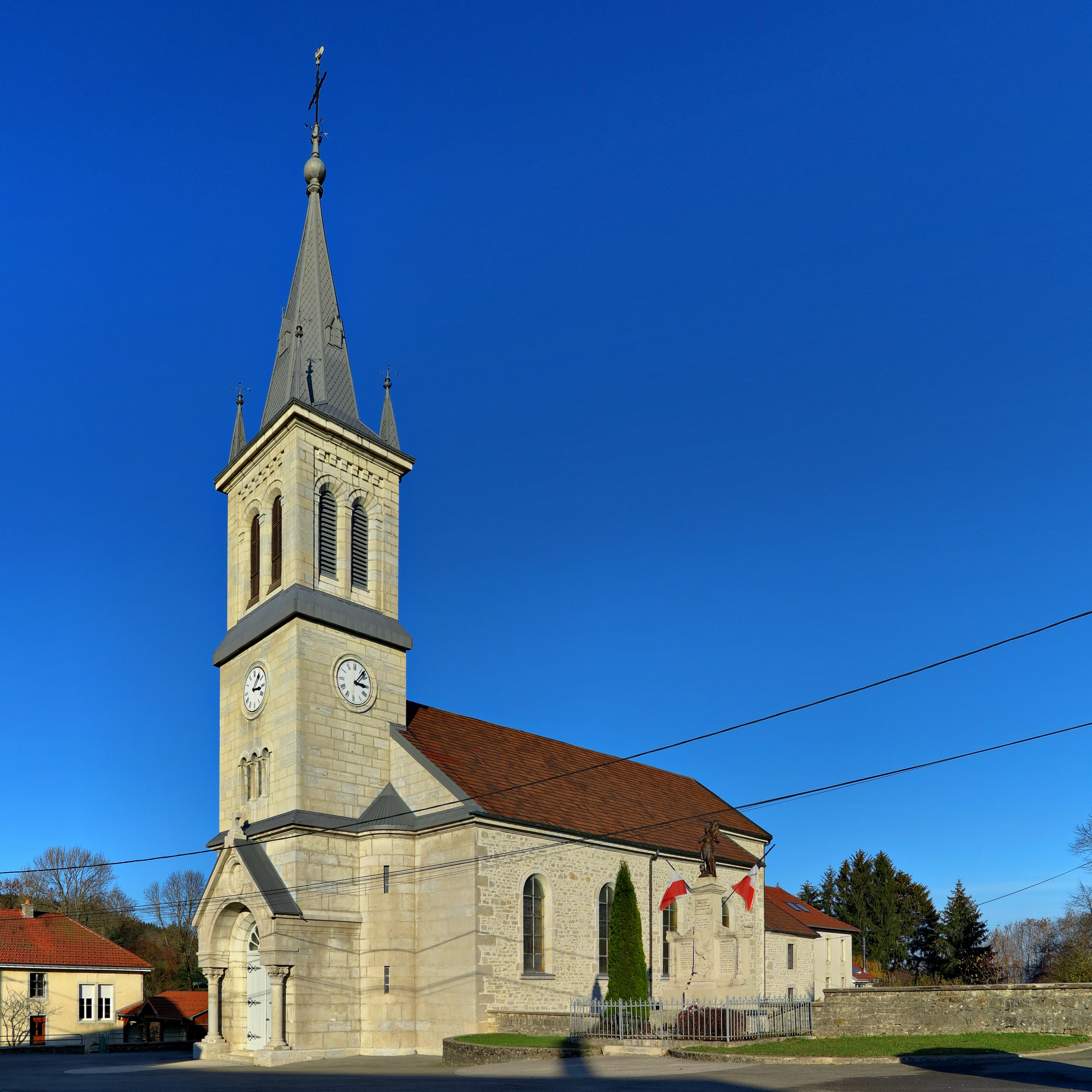 L'église